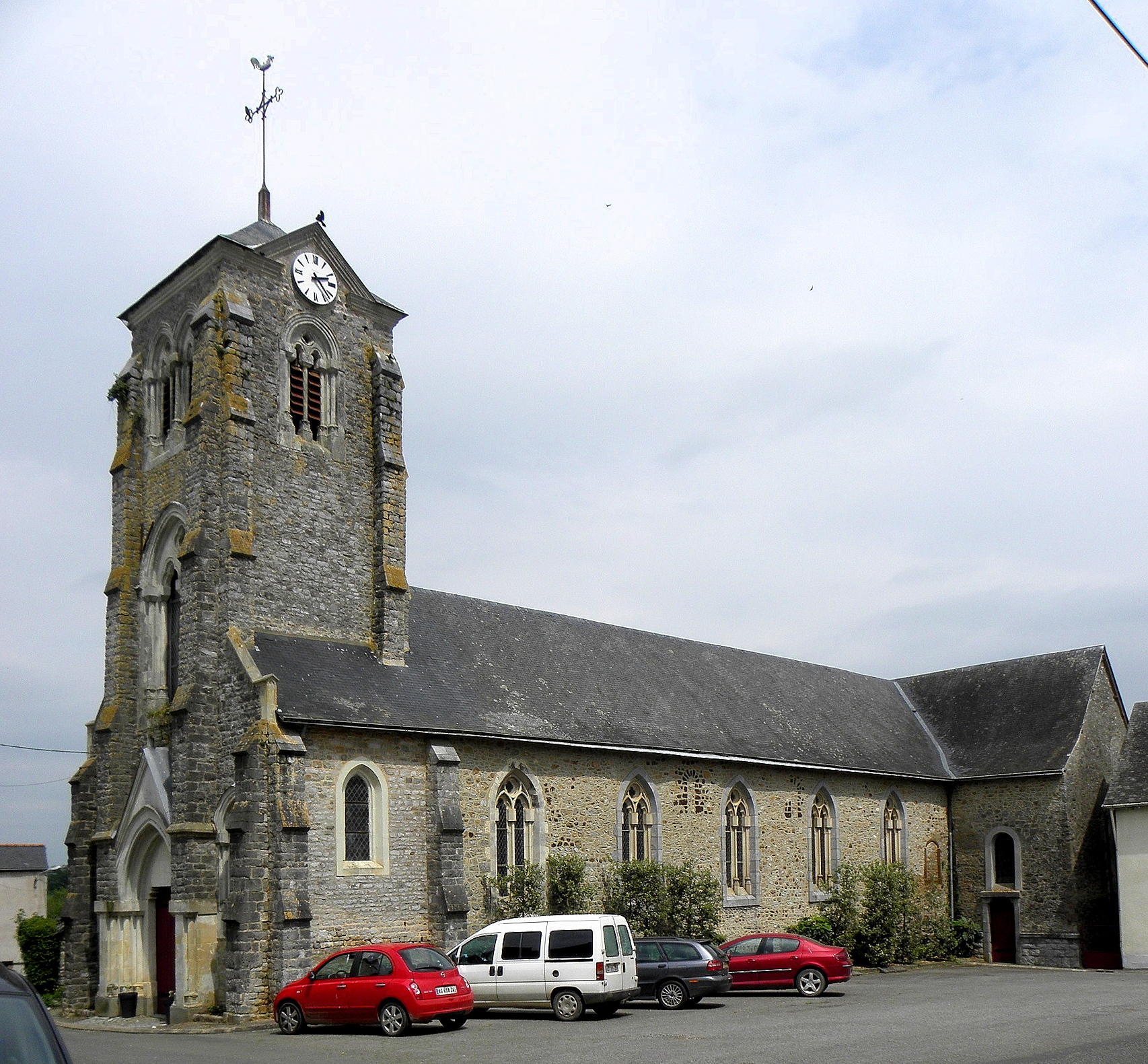 Église Saint-Gervais et Saint-Protais de La Bazouge-de-Chemeré (53).